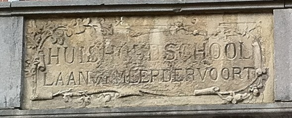 Huishoudschool Laan van Meerdervoort, oud naambord